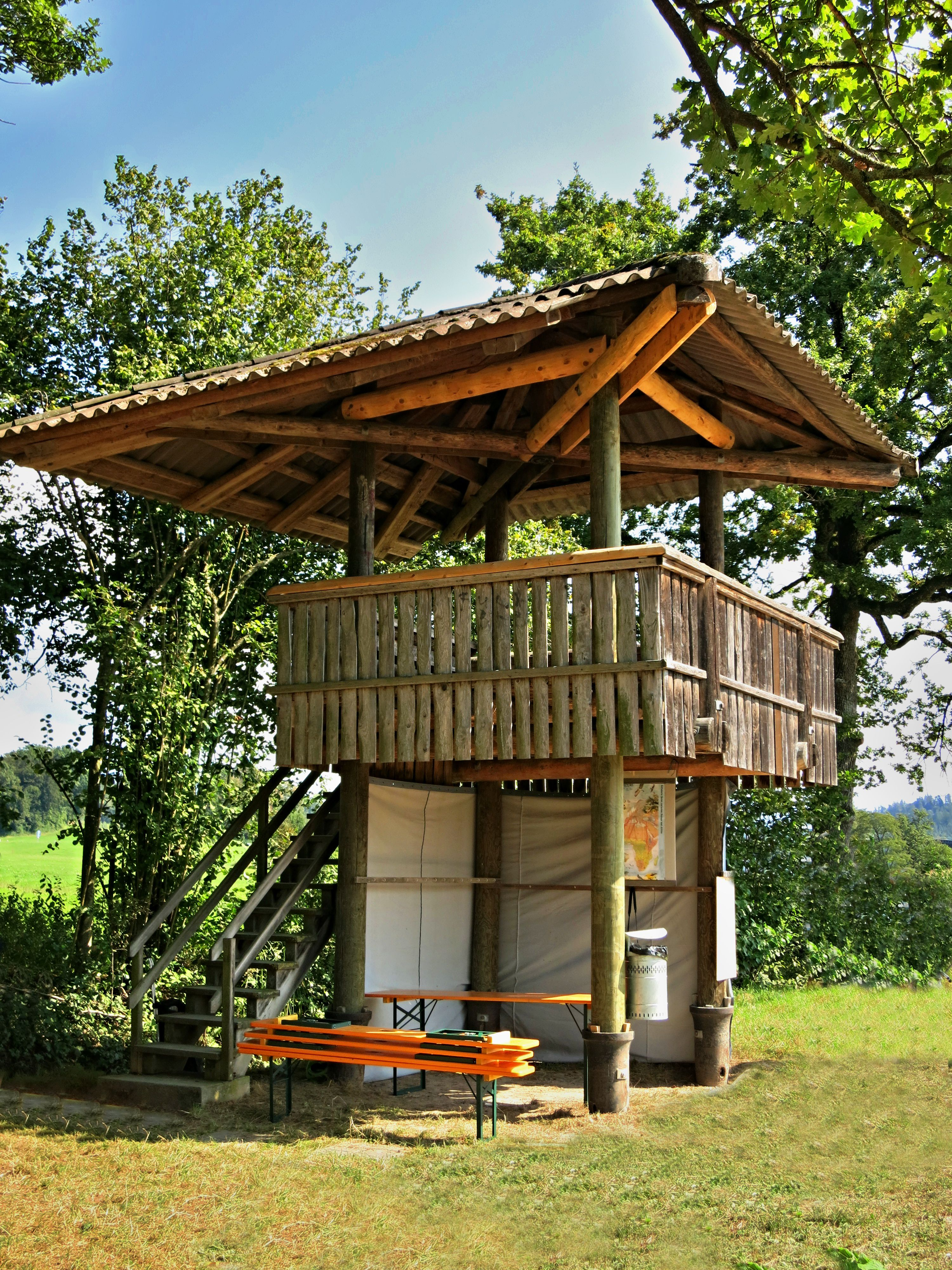 Joner Allmeind Beobachtungsturm